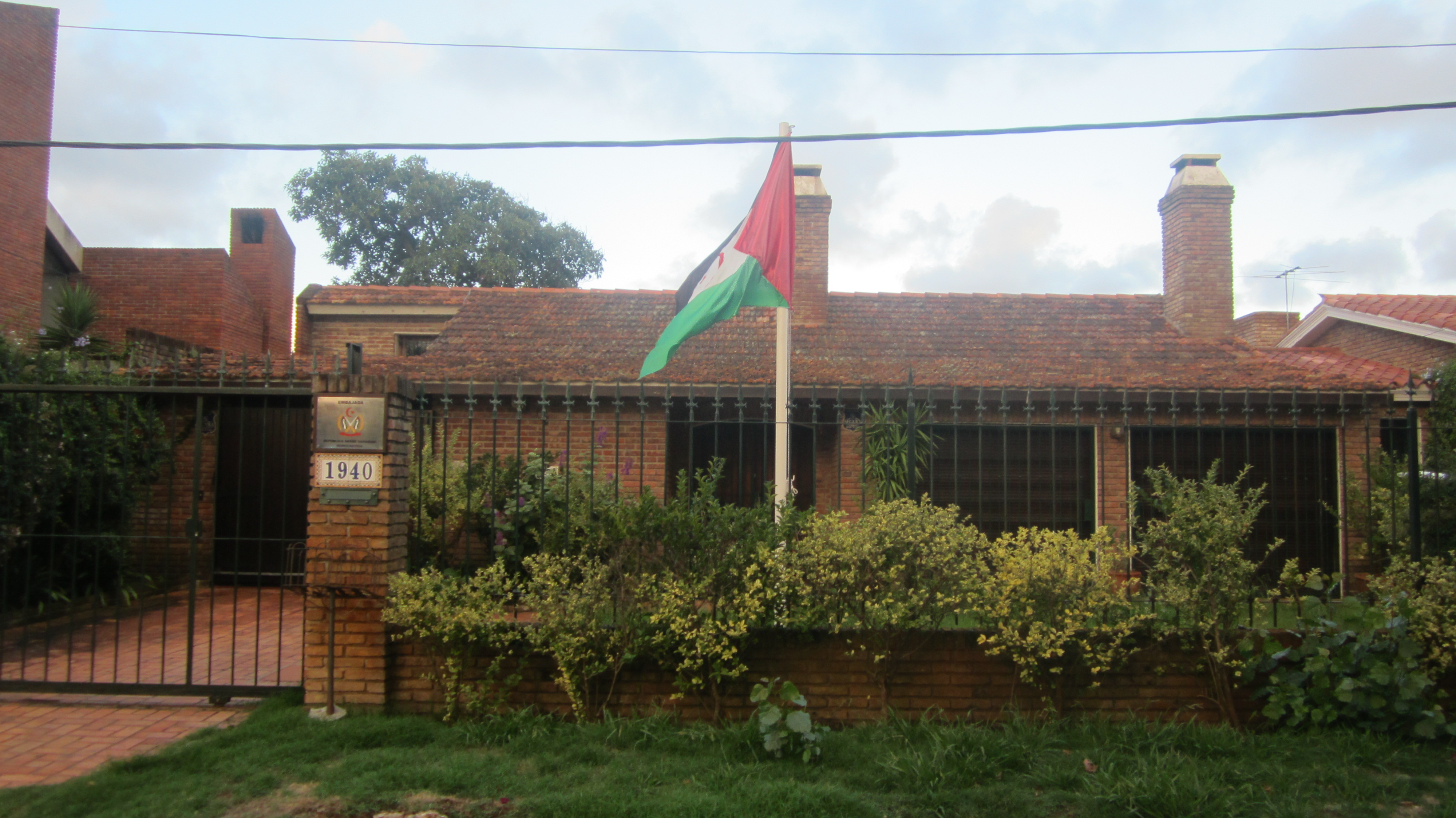 Embajada de la R.Á.S.D en Montevideo, Uruguay